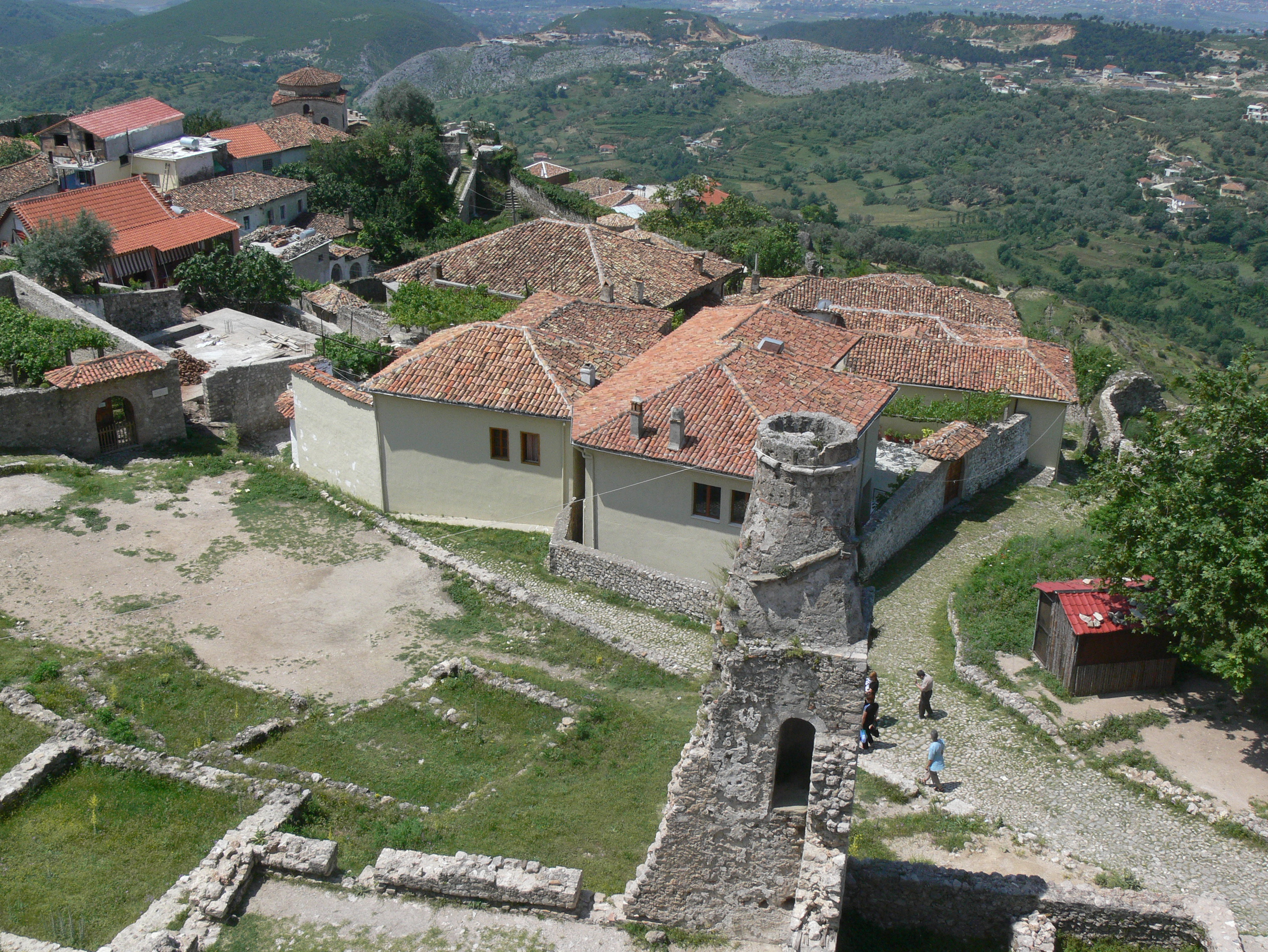 Reste der Festung von Krujë.